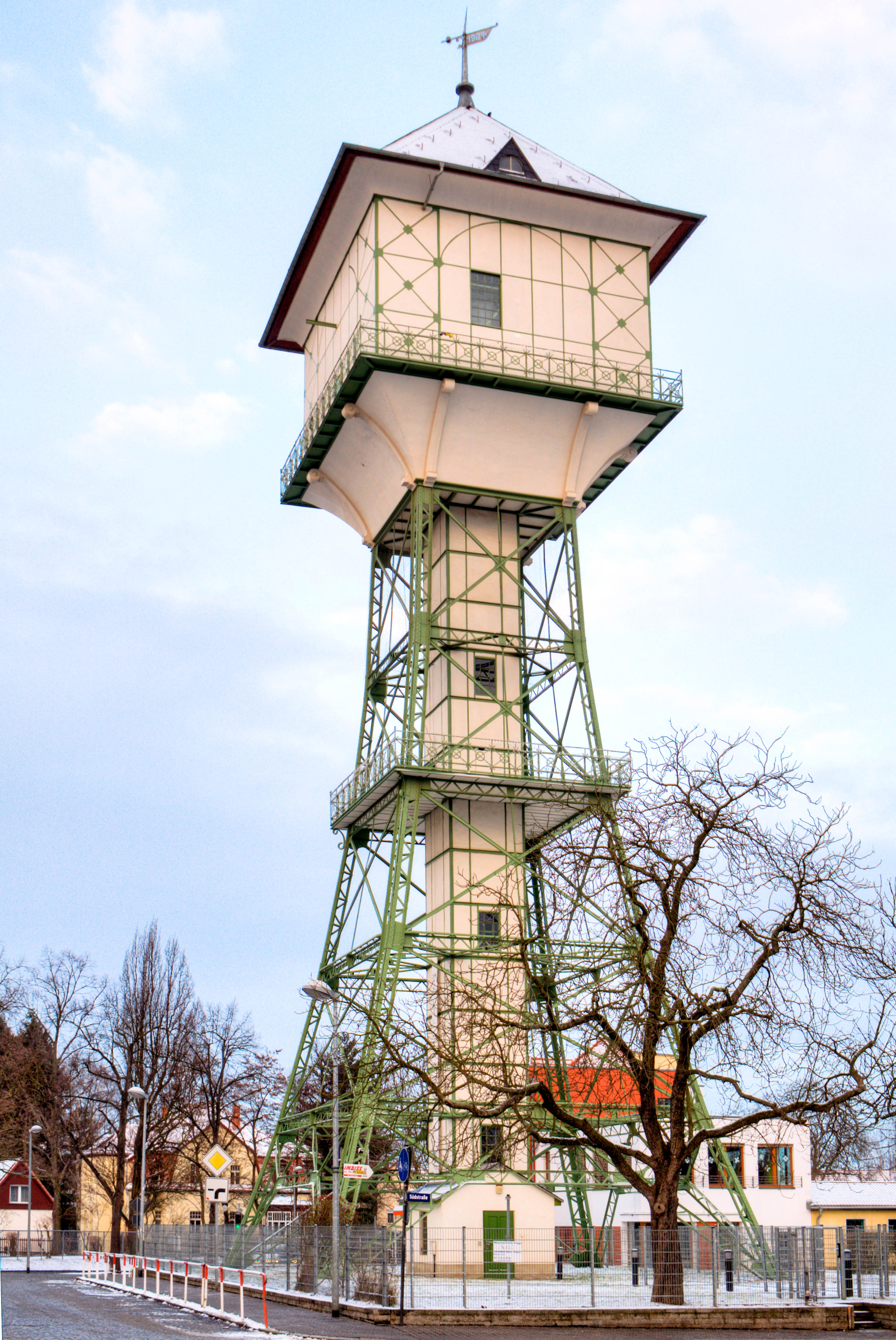 Wasserturm Groitzsch, außergewöhnliche Industriearchitektur in Taubenhausform. Stahlskelettbauwerk 45 m hoch, bis heute in Nutzung.